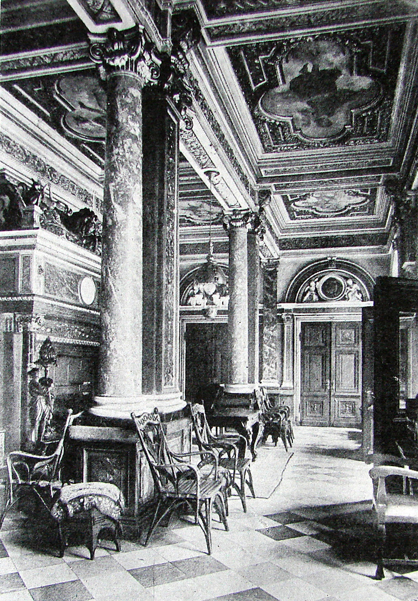 Frijsenborg Slot Hammel Sogn - Gjern Herred - Skanderborg Amt. Vestibule